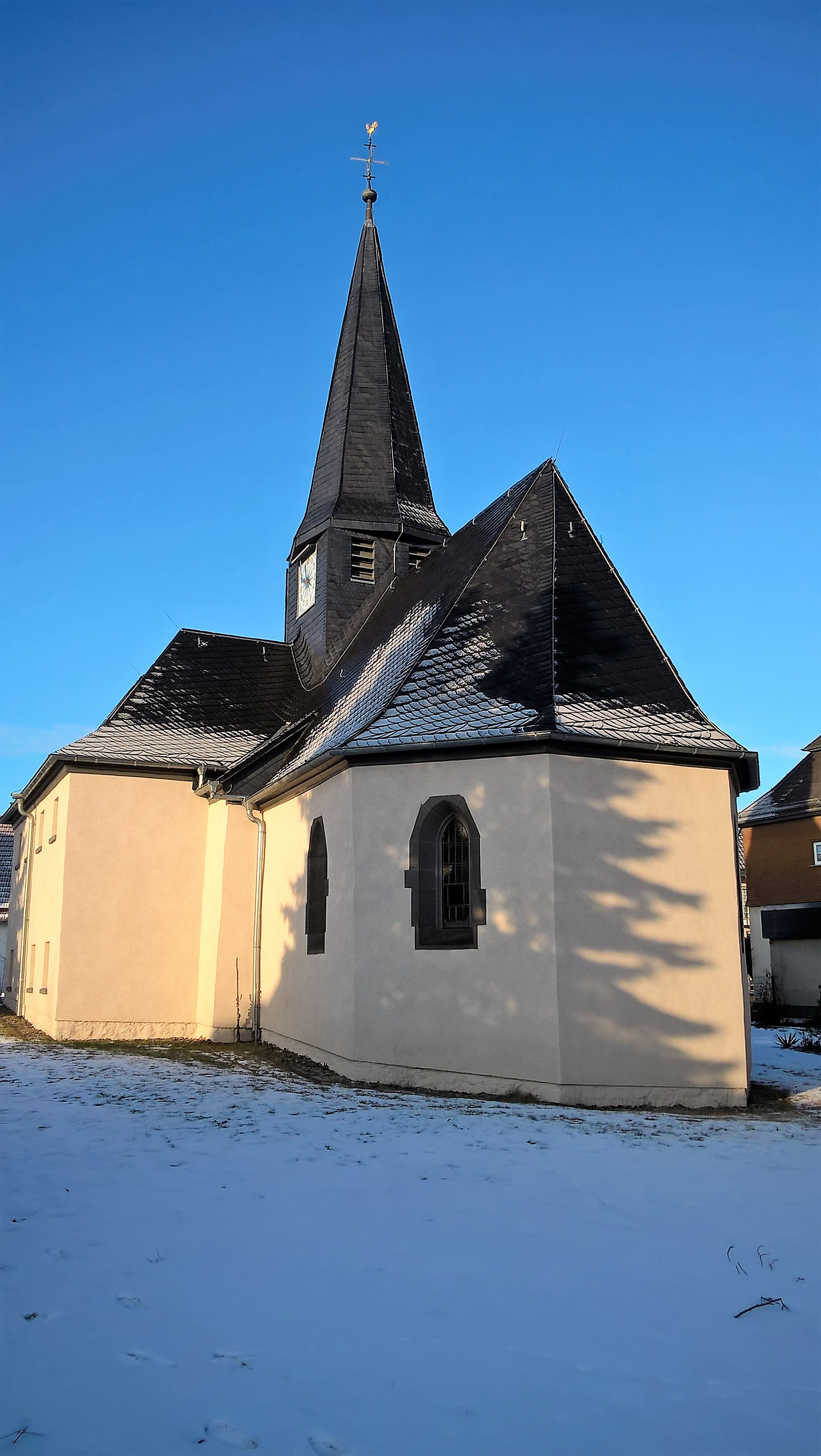 Evangelische Kirche Flensungen, Gemeinde Mücke, Vogelsbergkreis, Hessen, Deutschland